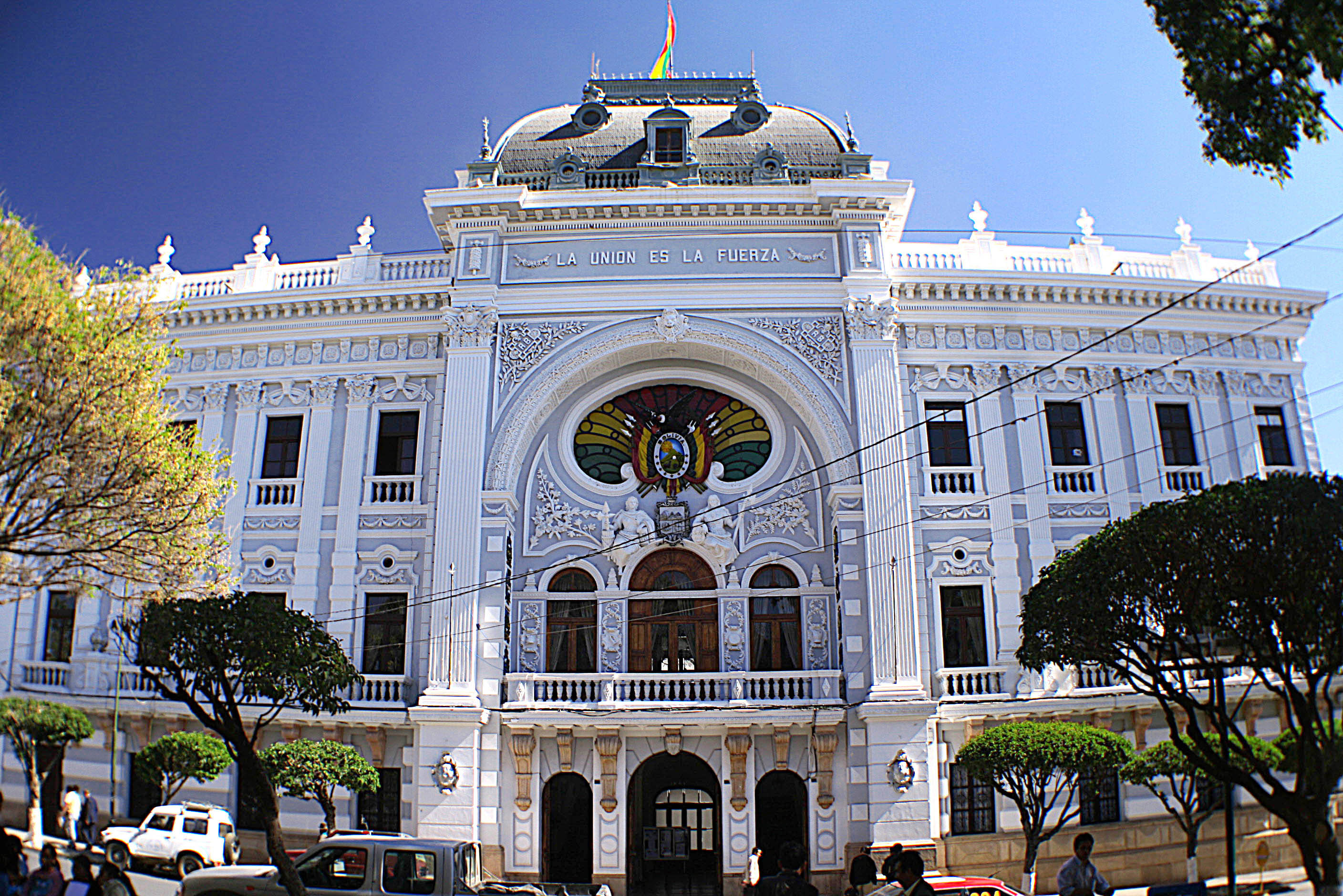 Prefeitura de Sucre (Prefectura de Sucre y Sede del Tribunal Constitucional de Bolivia)